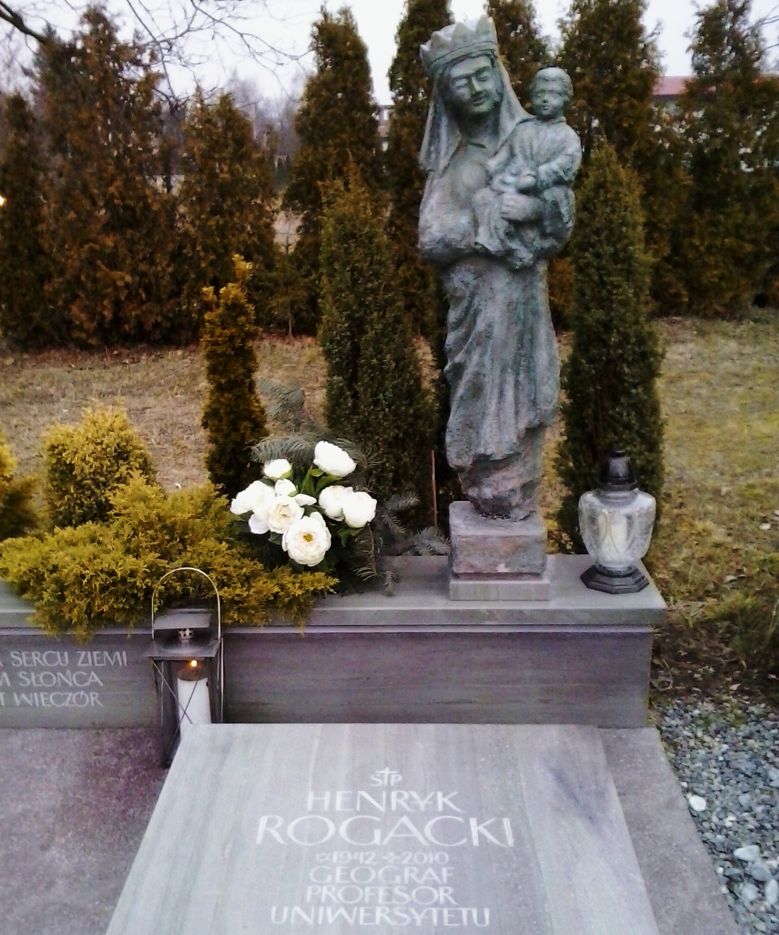 Grób prof. Henryka Rogackiego na cm. w Suchym Lesie.